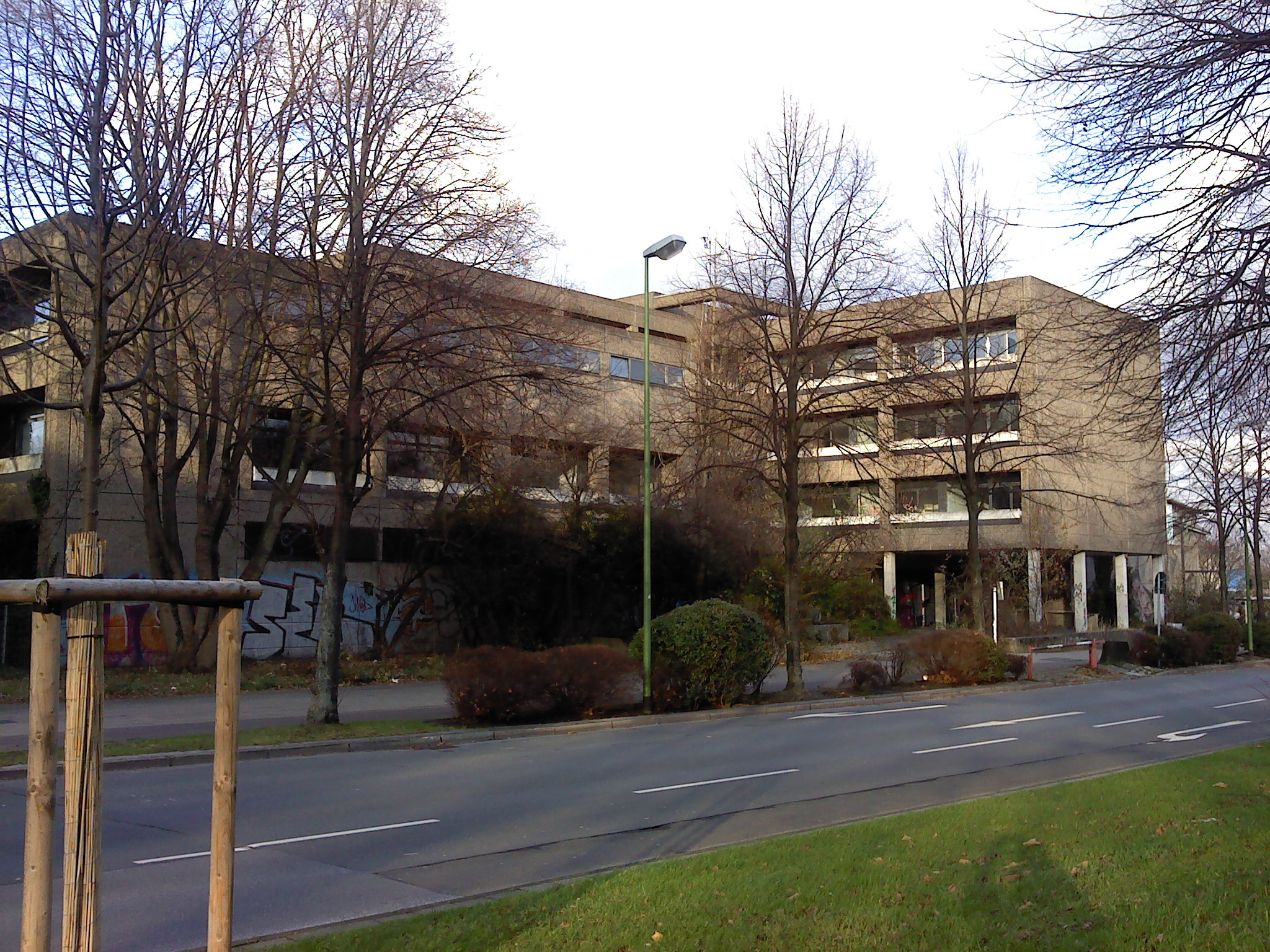 altes Volkshochschulgebäude in Essen, in Betrieb von 1971 bis 2004, seitdem leerstehend, 2014 abgerissen